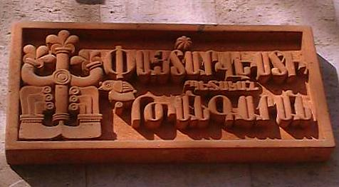 Հայաստանի փայտարվեստի թանգարան